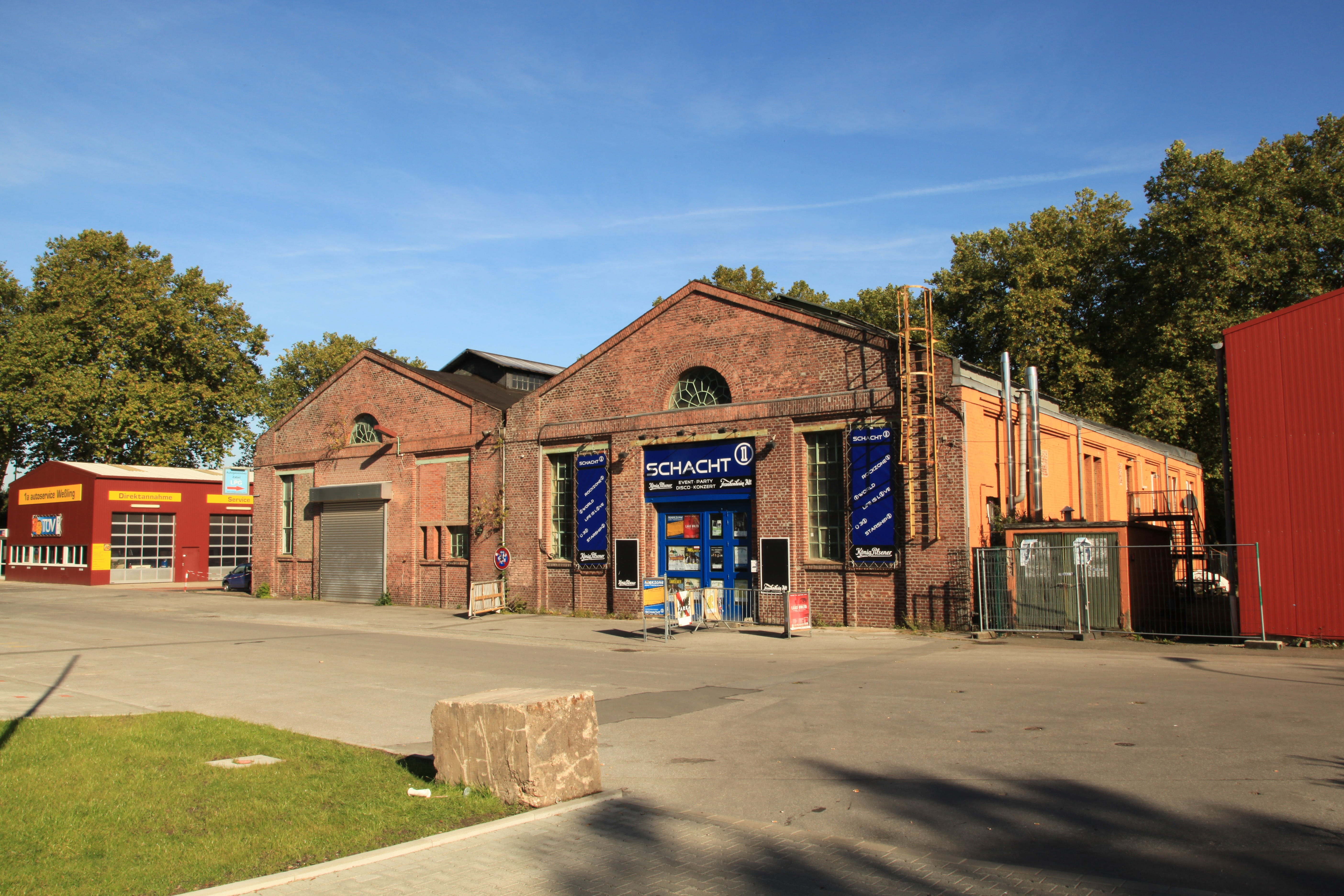 Verbliebene Gebäude der ehemaligen Zeche Oberhausen, Essener Straße in Oberhausen